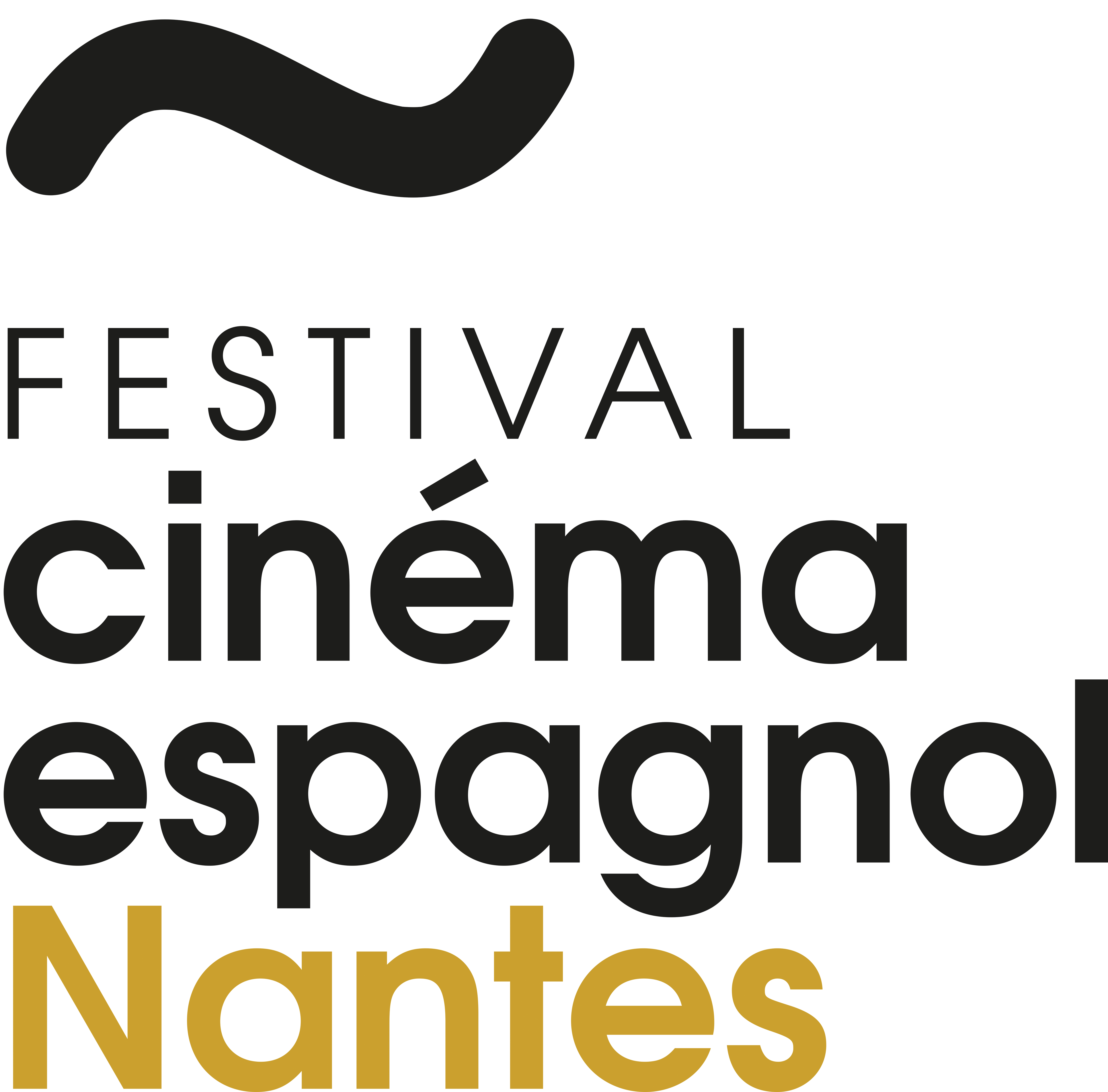 Identité visuelle Festival du Cinéma Espagnol de Nantes. © mcomedia